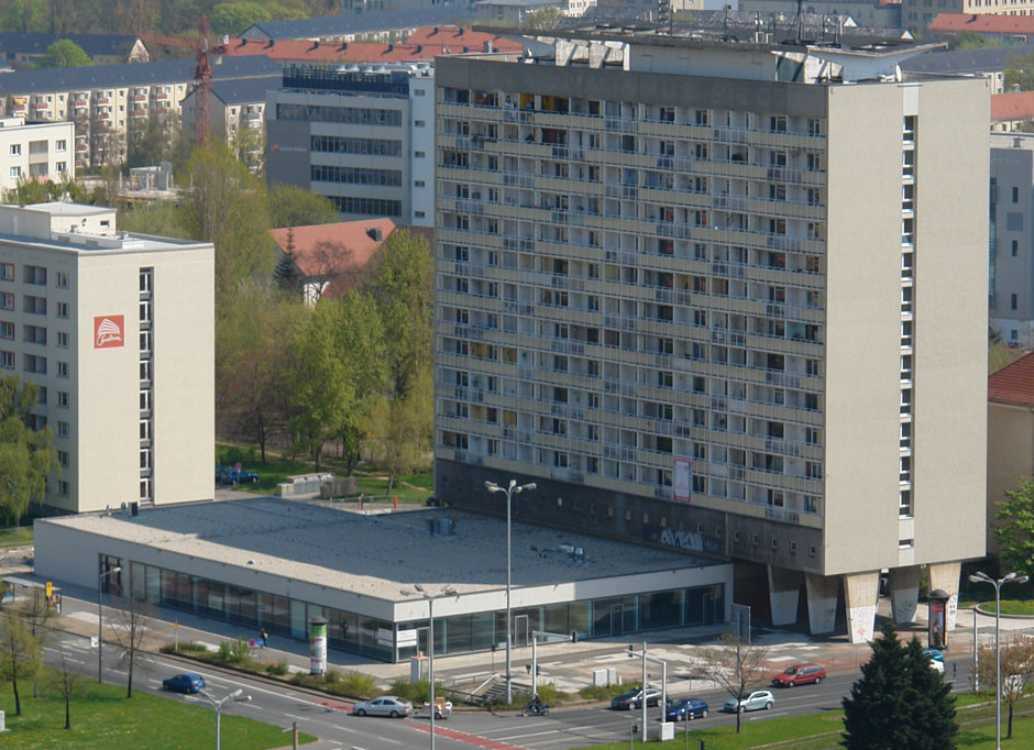 Blick vom Dresdner Rathaustum auf den Pirnaischen Platz vor dessen Umbau (Schließung der Fußgängertunnel)